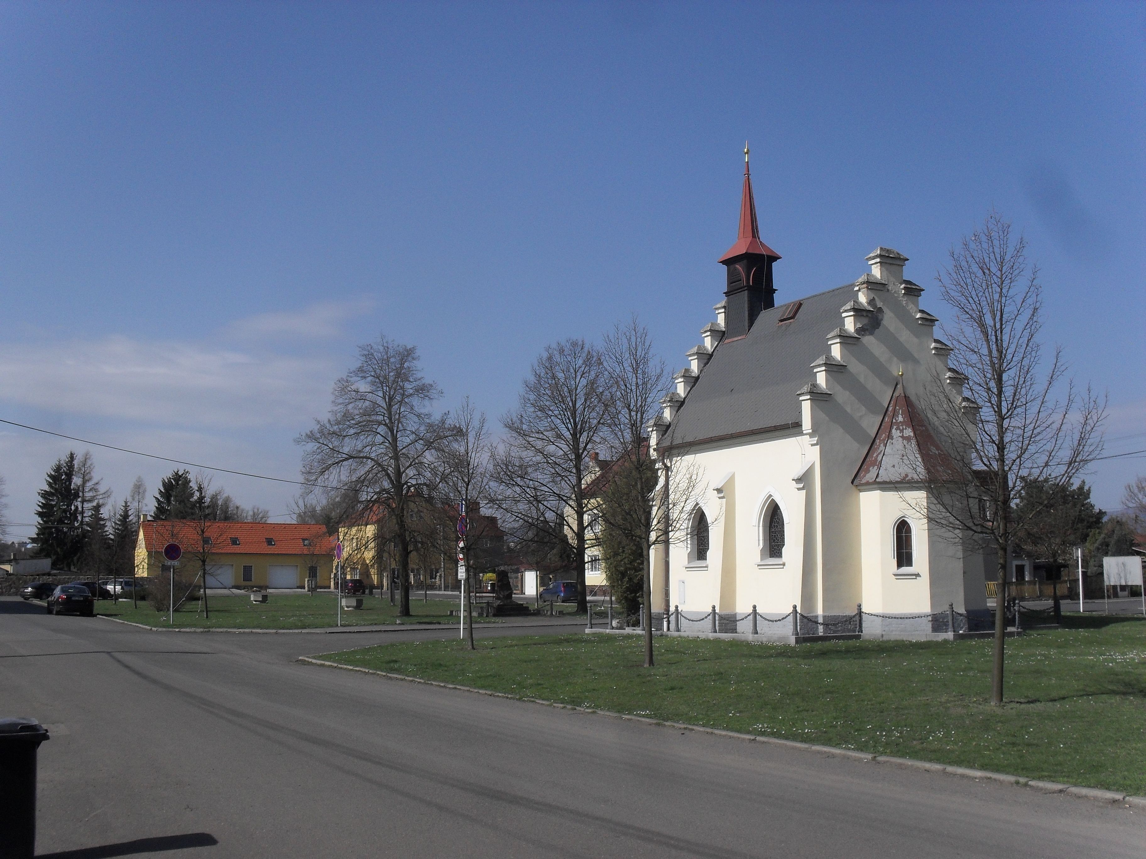 Fotografie pořízená v Nových Srbicích, okres Teplice.